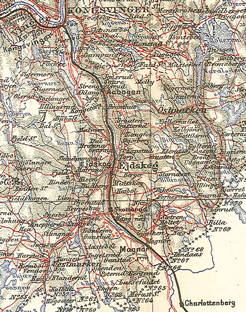 Grensebanen Kongsvinger-Riksgrensen.